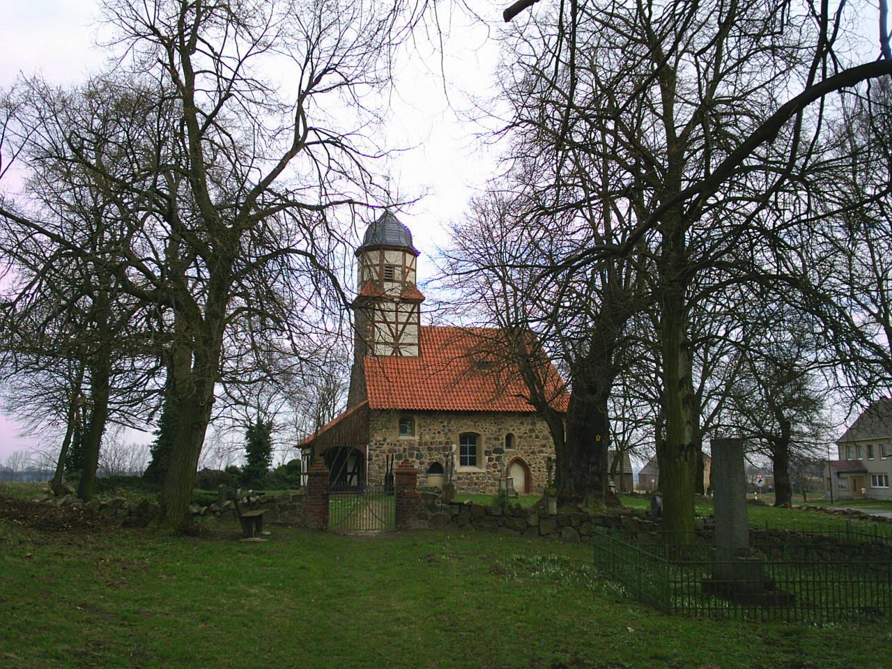 Die Feldsteinkirche in Zixdorf (Gemeinde Rabenstein/Fläming, südlich Niemegk)